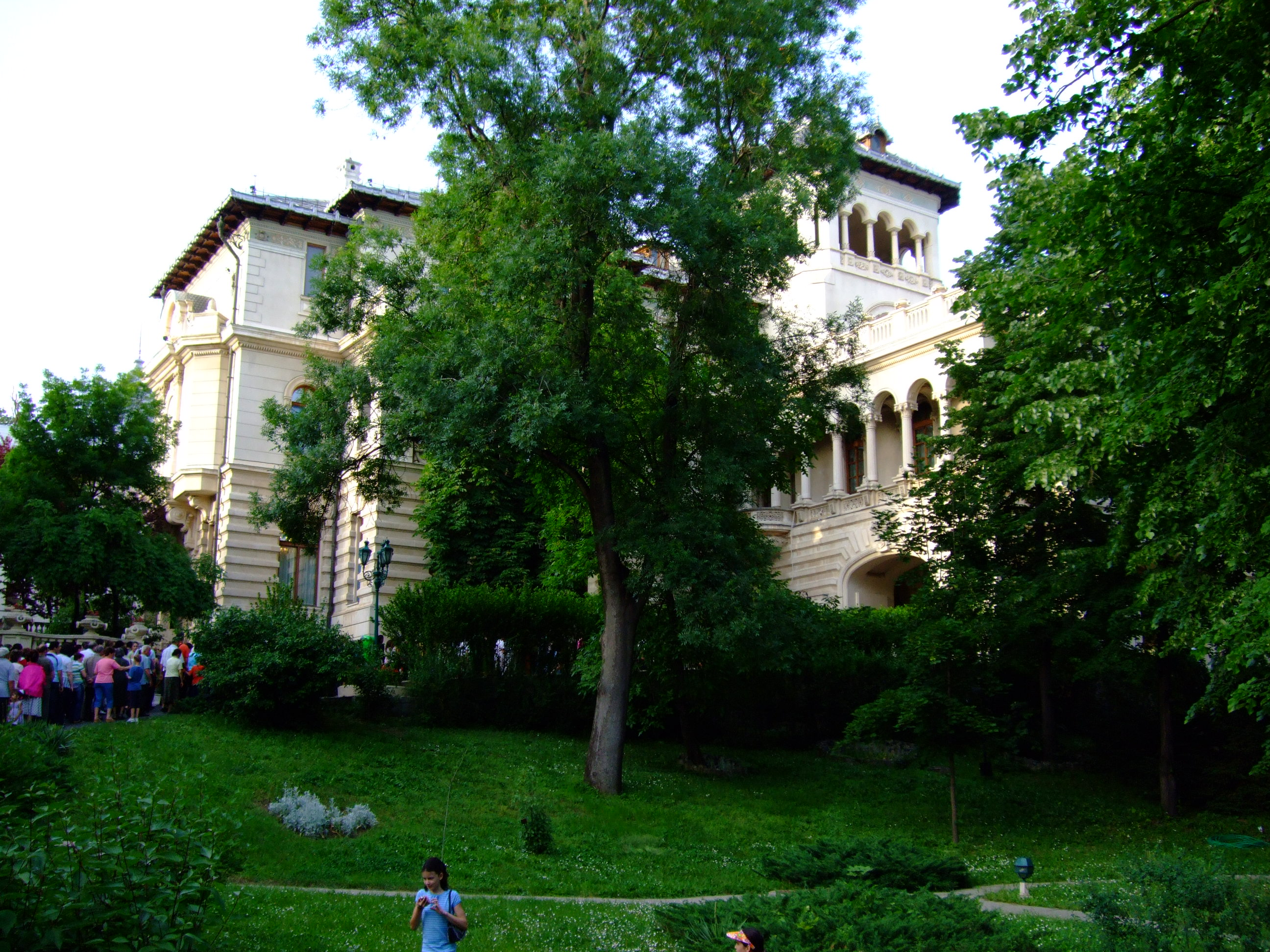 Cotroceni Palace - Bucharest 18.05.2008